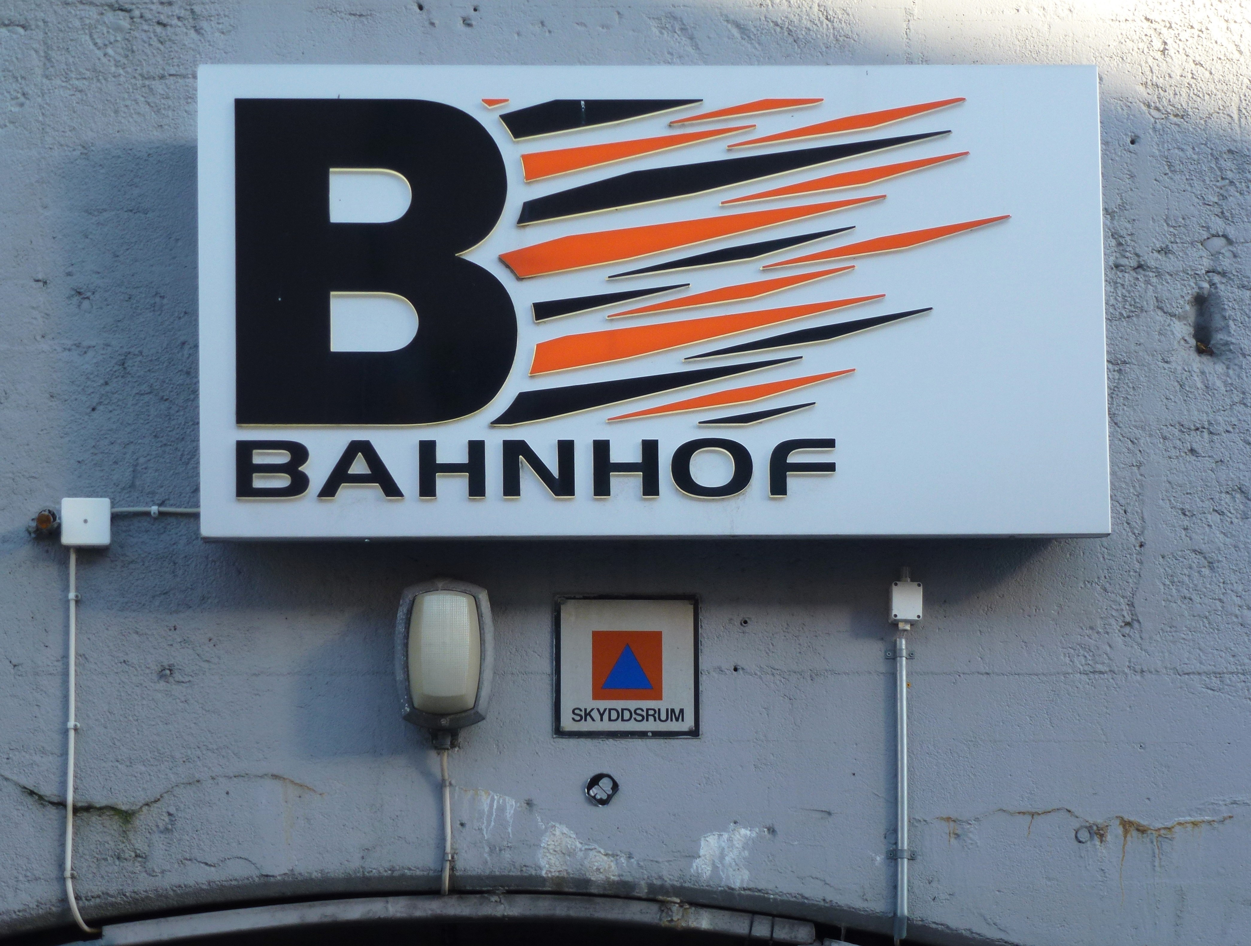 Pionen, skyddsrum